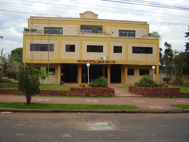 Palacete municipal de la ciudad de Itá.